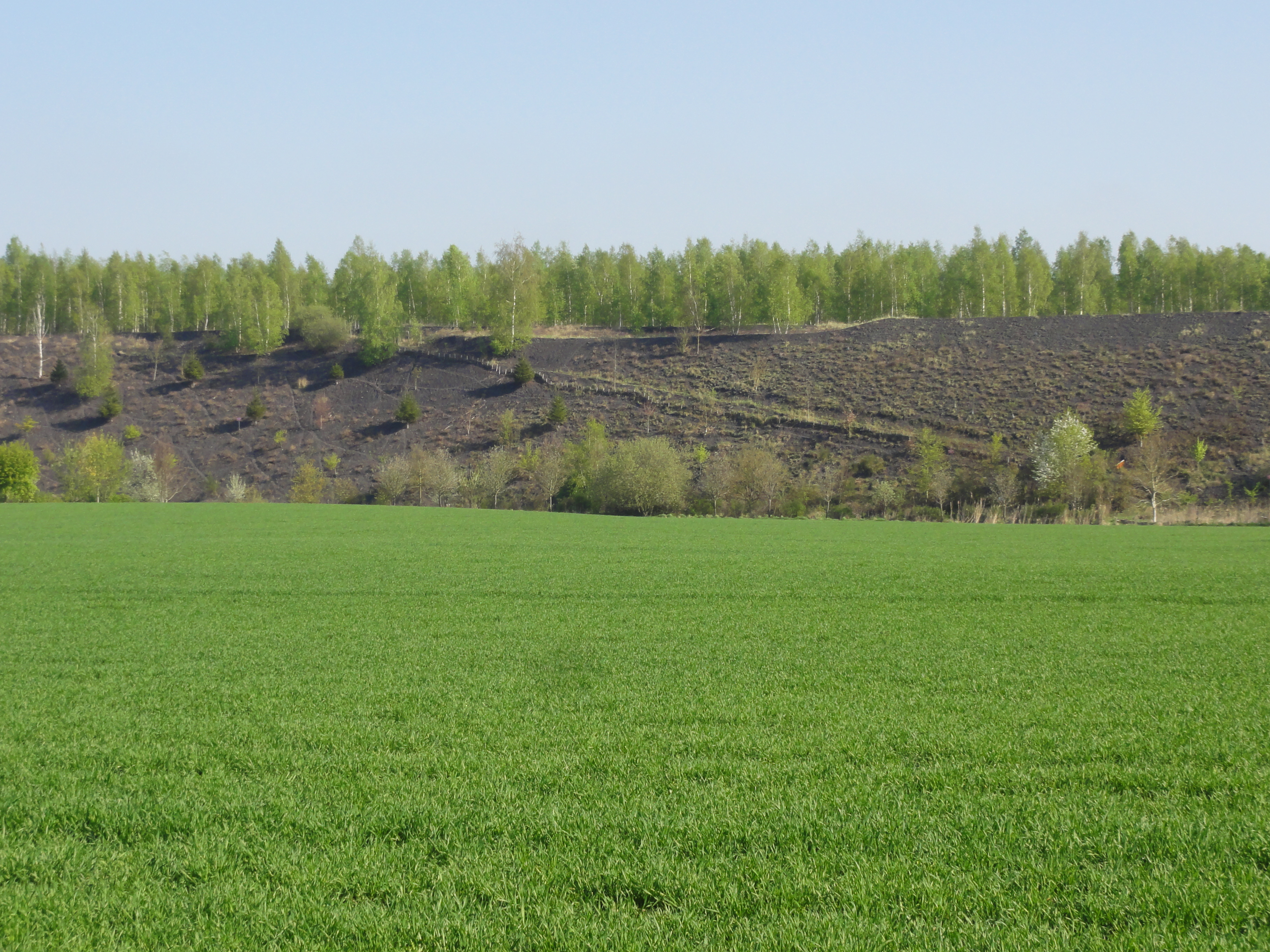 Terril Germinies Nord, Fosse Barrois, Marchiennes et Flines-lez-Raches, Nord, Nord-Pas-de-Calais, France.